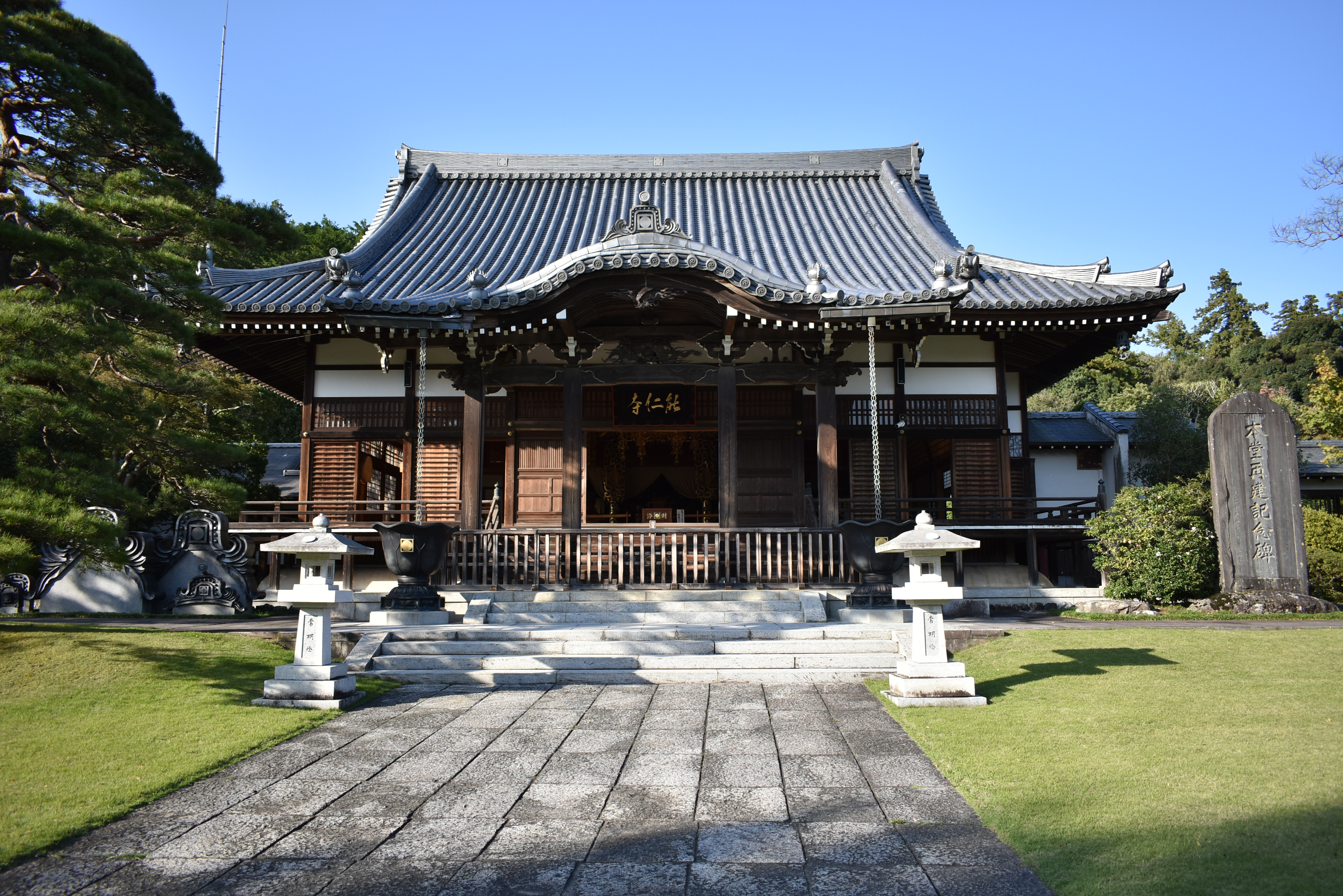 飯能市 能仁寺